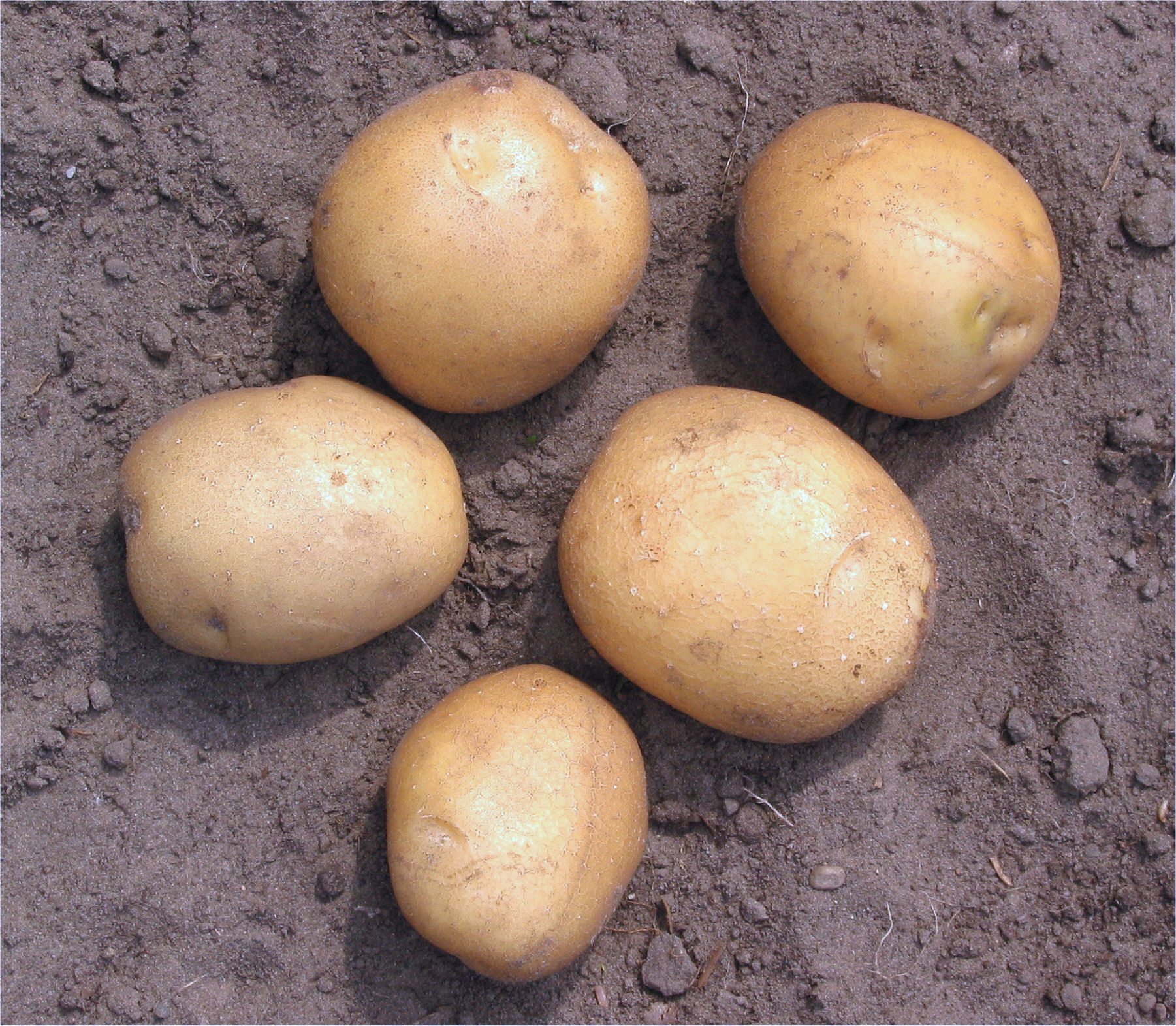 (nl: Aardappel 'Doré') Solanum tuberosum 'Doré'